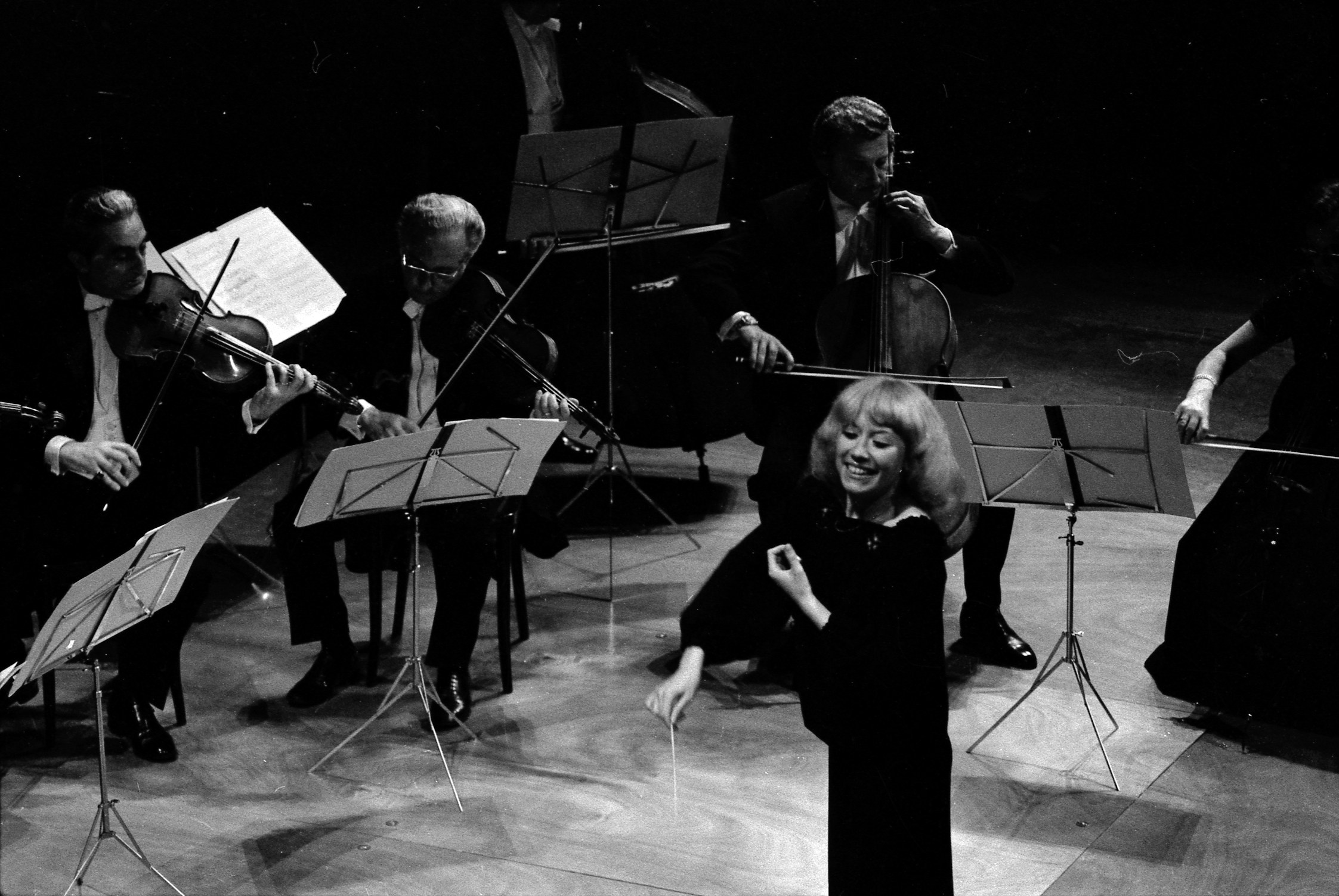 Pas de lieu. Le 14 juin 1973. Vue de Claude Manlay qui dirige l'Orchestre Auriacombe lors d'un concert. Observation: Premier concert de Claude Manlay, femme chef d'orchestre, avec l'orchestre de chambre Louis Auriacombe.